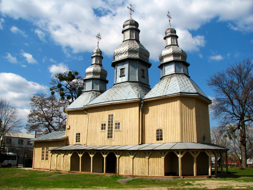 Покровська церква Фастів